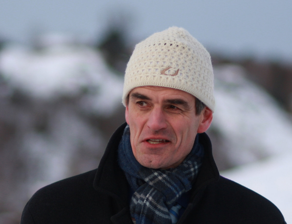 Bjørn Ole Gleditsch, Ordfører